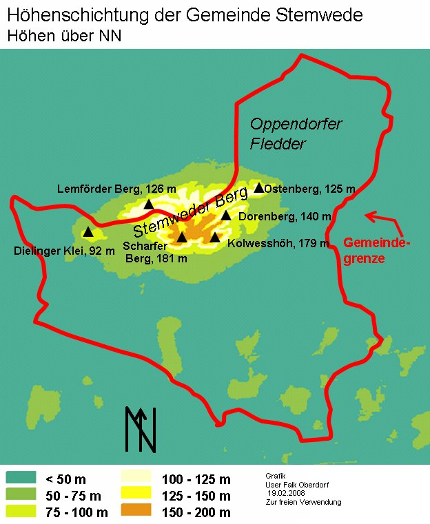 Physische Karte der Gemeinde Stemwede